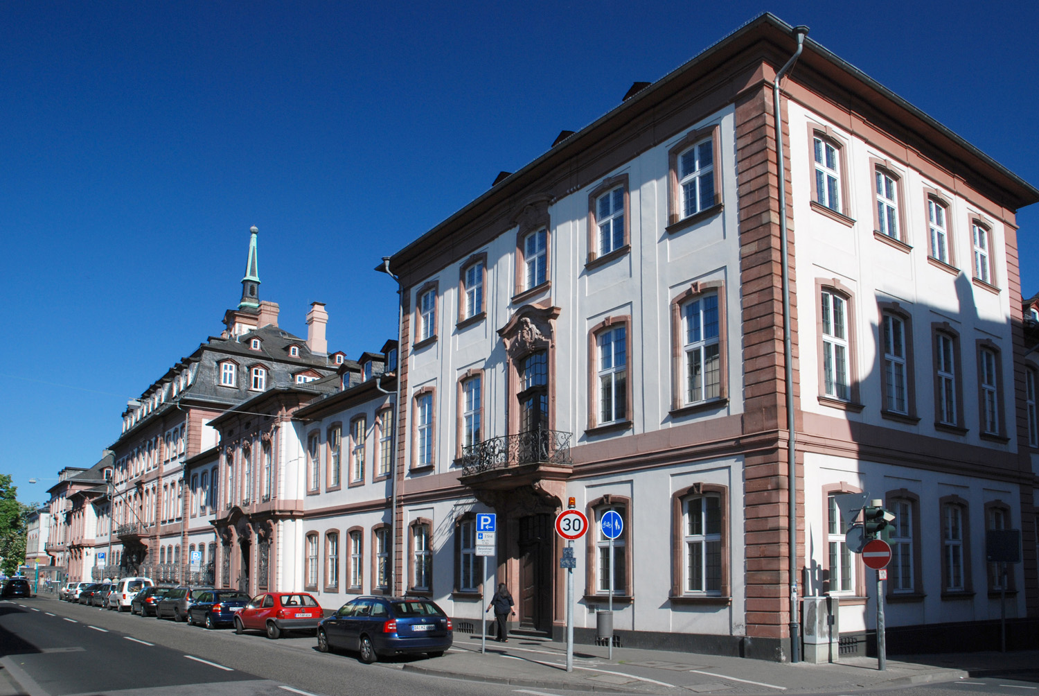 Straßenfront des Bolongaropalastes in Höchst